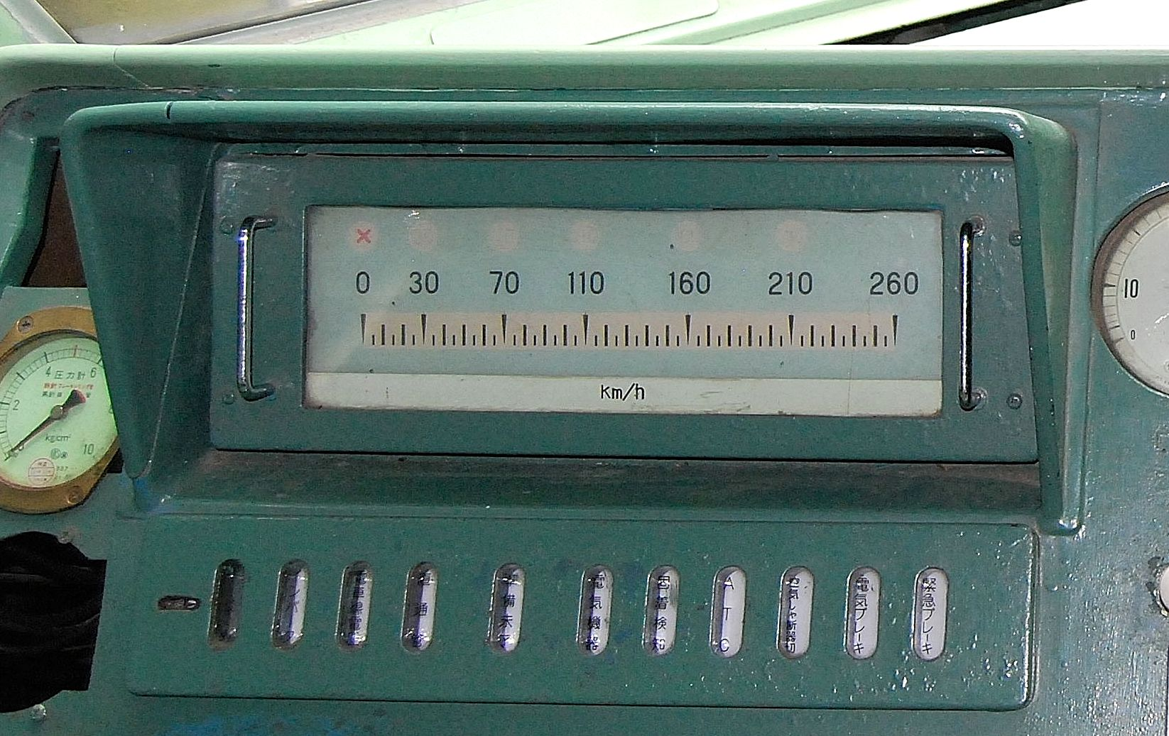 青梅鉄道公園に保存されている0系新幹線電車の運転席に設置されている の速度計（下の表示）と自動列車制御装置（ATC-1型）の車内信号表示（上の丸形の表示）、また下の速度計は指示速度がATCの各速度段の範囲に入るとその範囲が点灯するようになっている。（公開中に撮影）